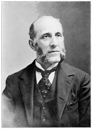 P.V.N. Myers, circa 1895